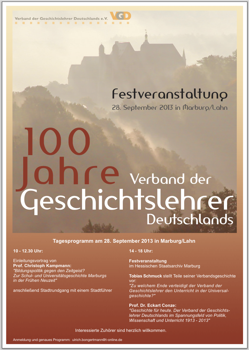 Plakat des VGD